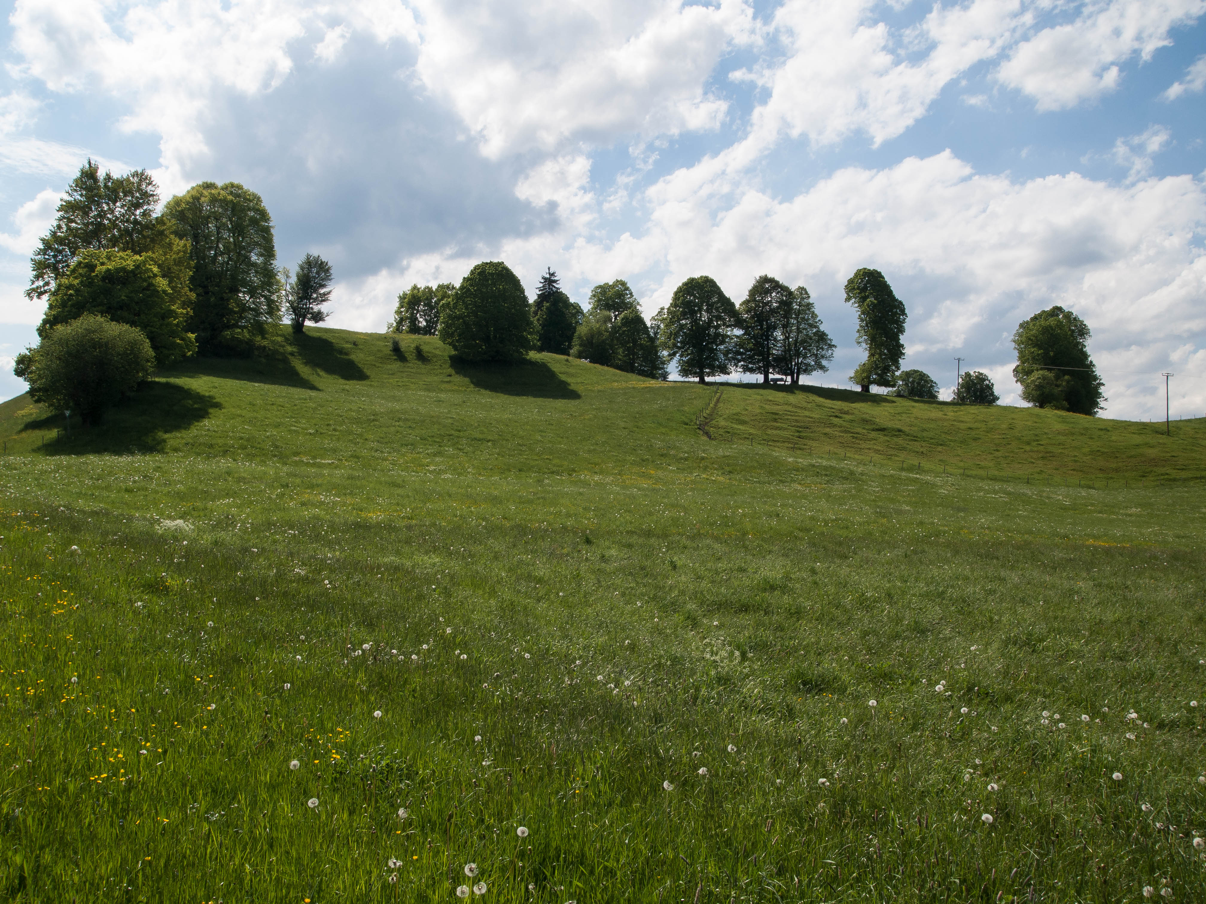 Blick von Südosten auf den Lindenbestand bei Schwaig südlich von Wildsteig, Oberbayern. (LSG:BY-LSG-00014.01)_Schutz des Lindenbestandes östlich Schwaig im Bereich der Gemeinde Wildsteig